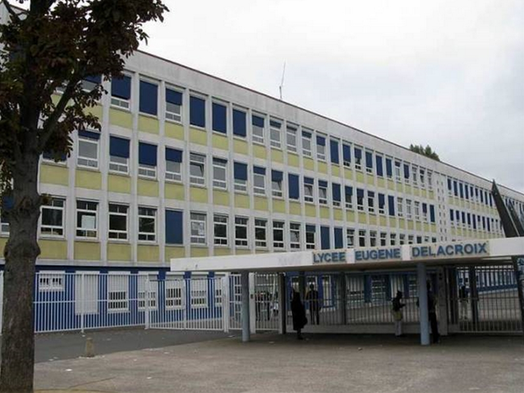 Le lycée Eugène-Delacroix à Drancy